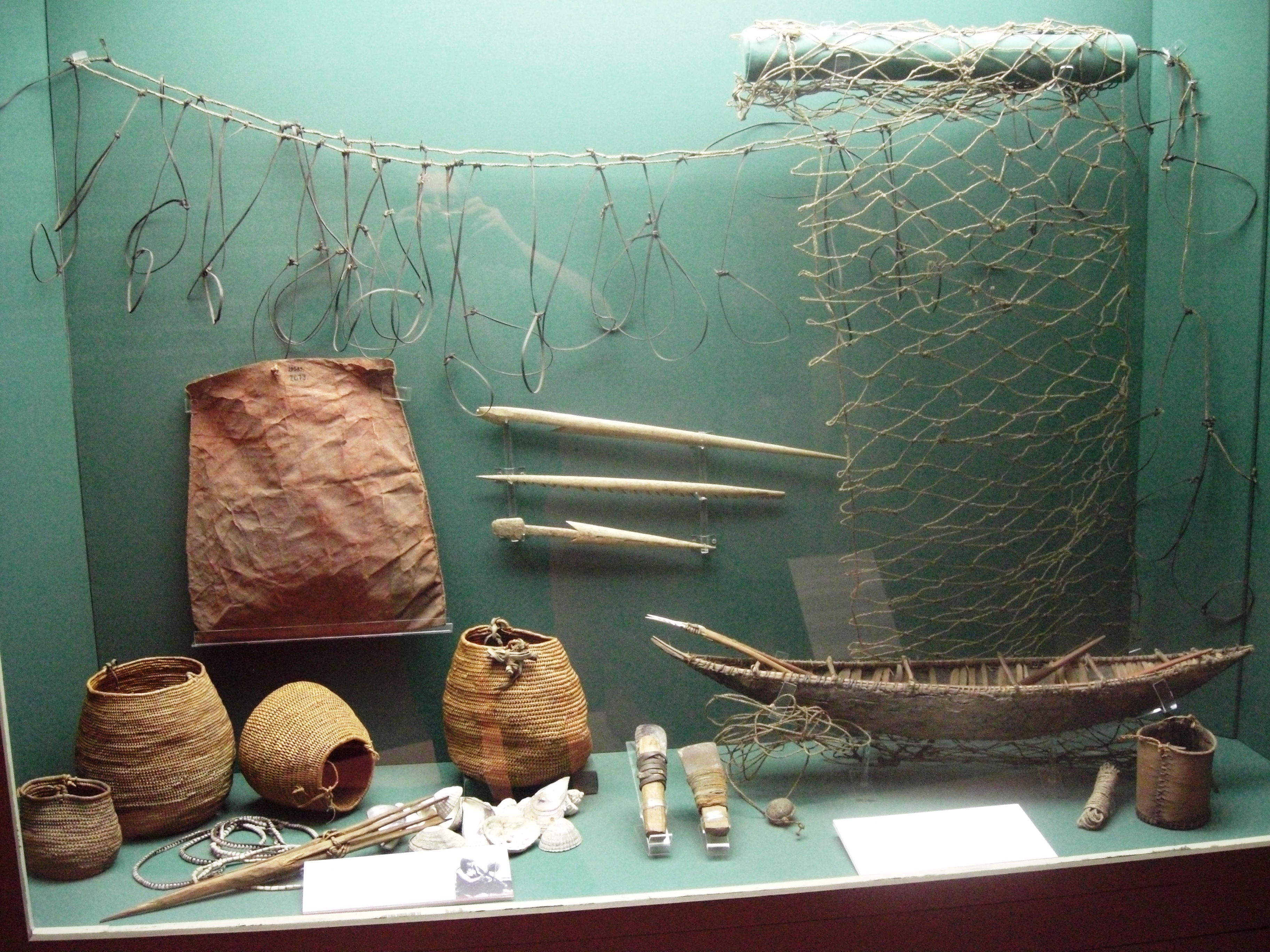 Vitrina dedicada a los pueblos nómades del mar, Tierra del Fuego, Argentina. Cultura Yámaná o Yagán. Museo de la Plata. Argentina